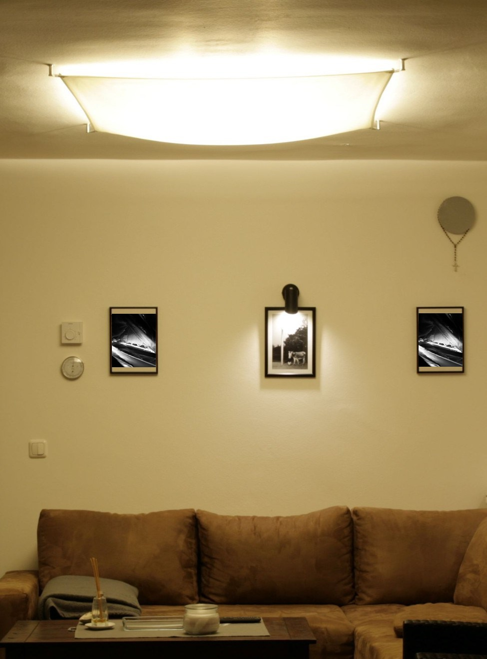 Lichtsegel mit warmweissen E27 LED Birnen